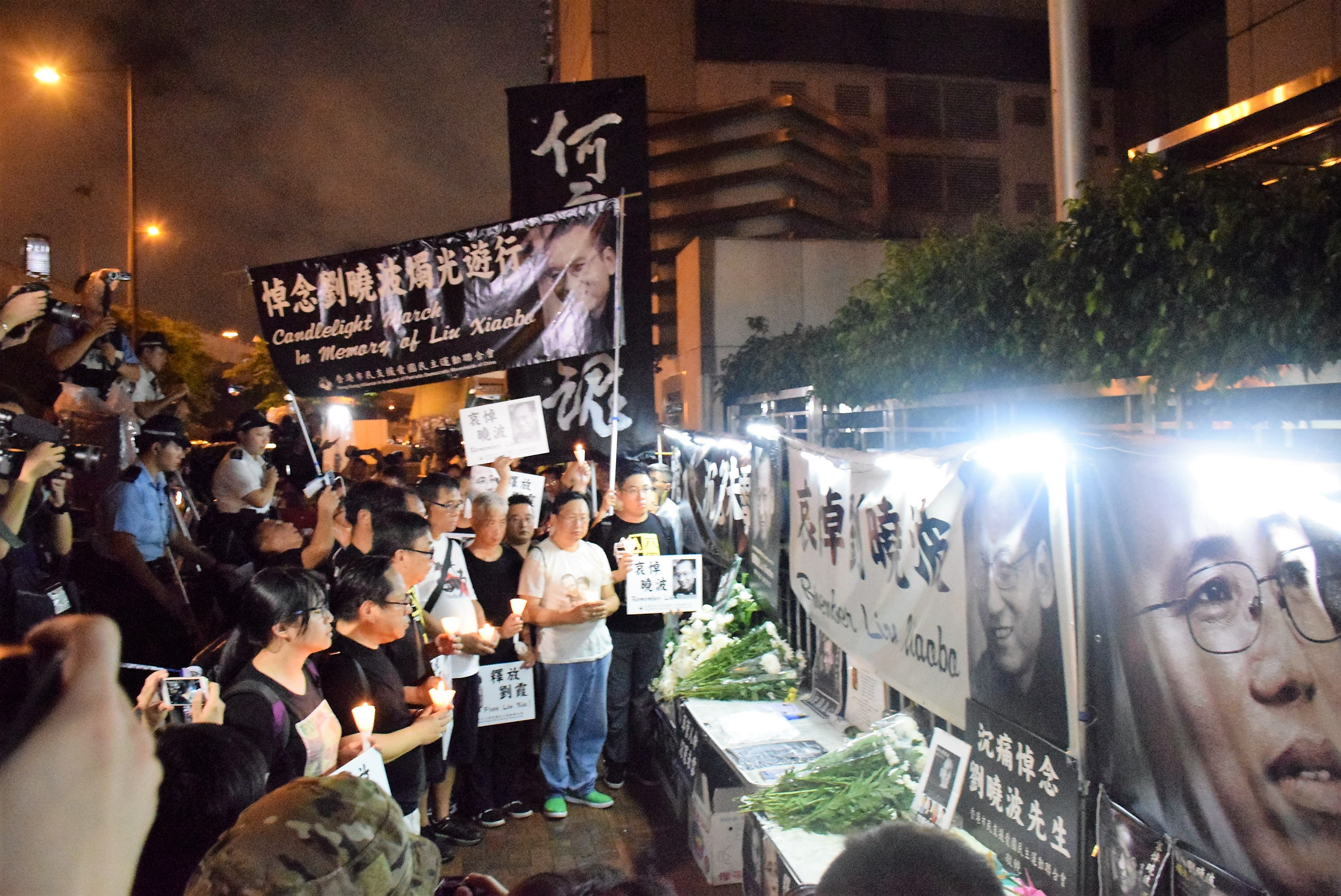 諾貝爾和平獎得主，中共民主運動綱領性文件《零八憲章》起草人之一、學者和作家劉曉波病逝。本圖集匯集關於劉曉波及其影響的照片，也包括人們的紀念，追憶，哀悼和抗議。 香港中聯辦外面，成為人們聚集悼念劉曉波的場所(美國之音湯惠芸拍攝)